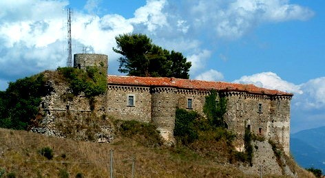 Rocca Cilento, frazione di Lustra: il castello.